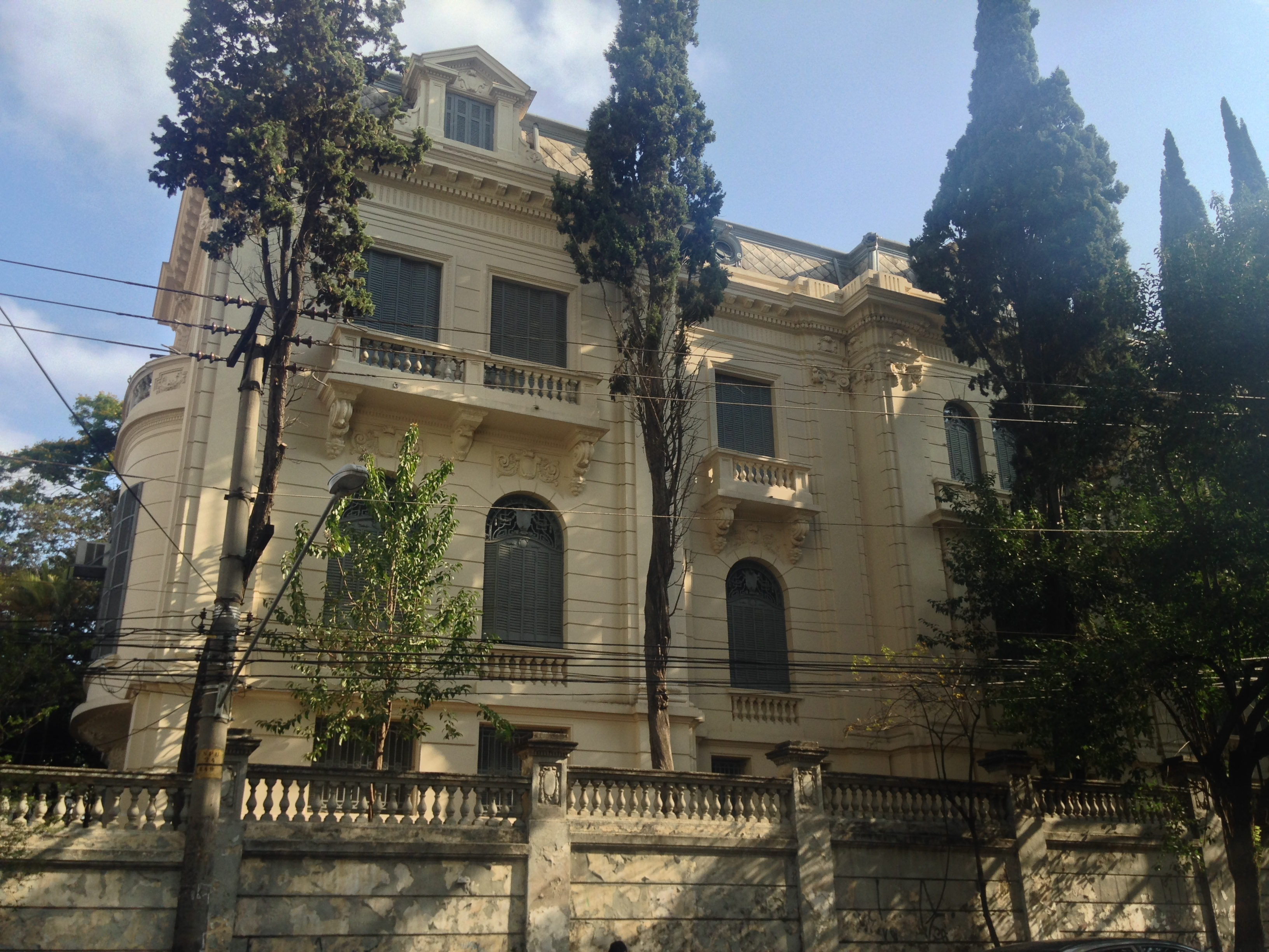 Vista lateral da Residência da Família Jafet, na Rua Bom Pastor, 825, em São Paulo (SP), Brasil.